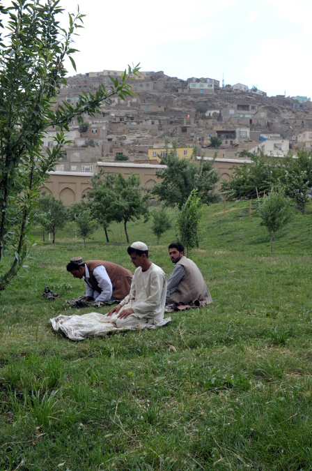 Men praying inside Babur Gardens in Kabul, Afghanistan.